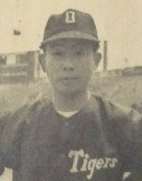 大崎三男